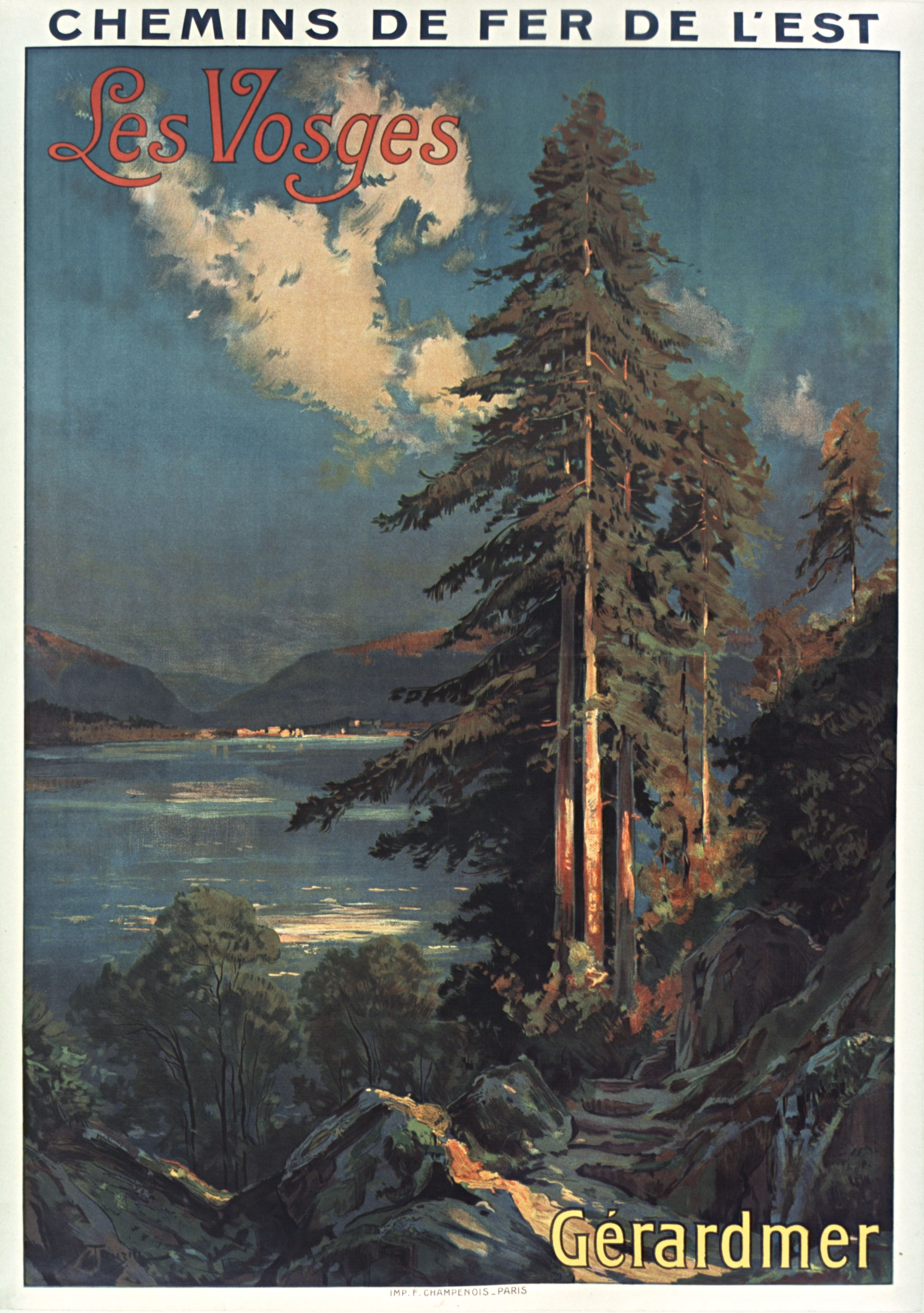 Chemins de fer de l'Est. Les Vosges. Gérardmer, affiche